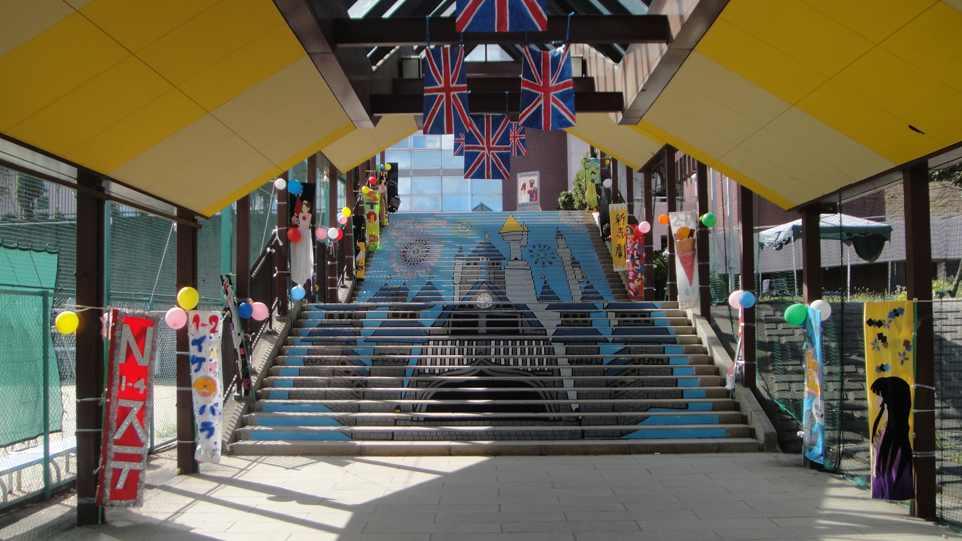 南平高校の文化祭の階段アート